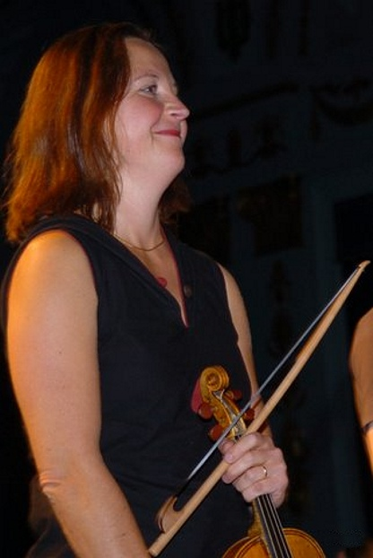 Odile Edouard, Geigerin, Barock und Renaissance, Historische Aufführungspraxis, Professorin für Barockvioline am Cons. Lyon